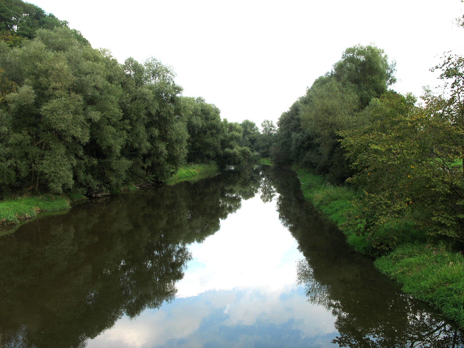 Der Fluß Attel bei Elend (Ortsteil von Wasserburg am Inn) kurz vor der Mündung in den Inn. (Deutschland, Bayern, Landkreis Rosenheim)